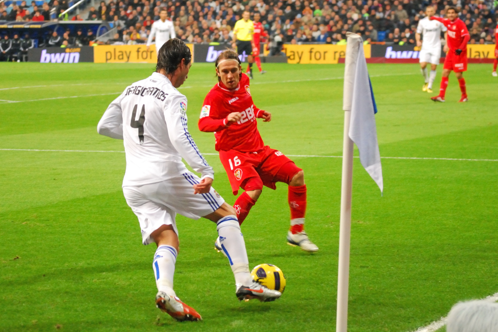 La liga 19-12-2010 Real Madrid 1 - Sevilla 0